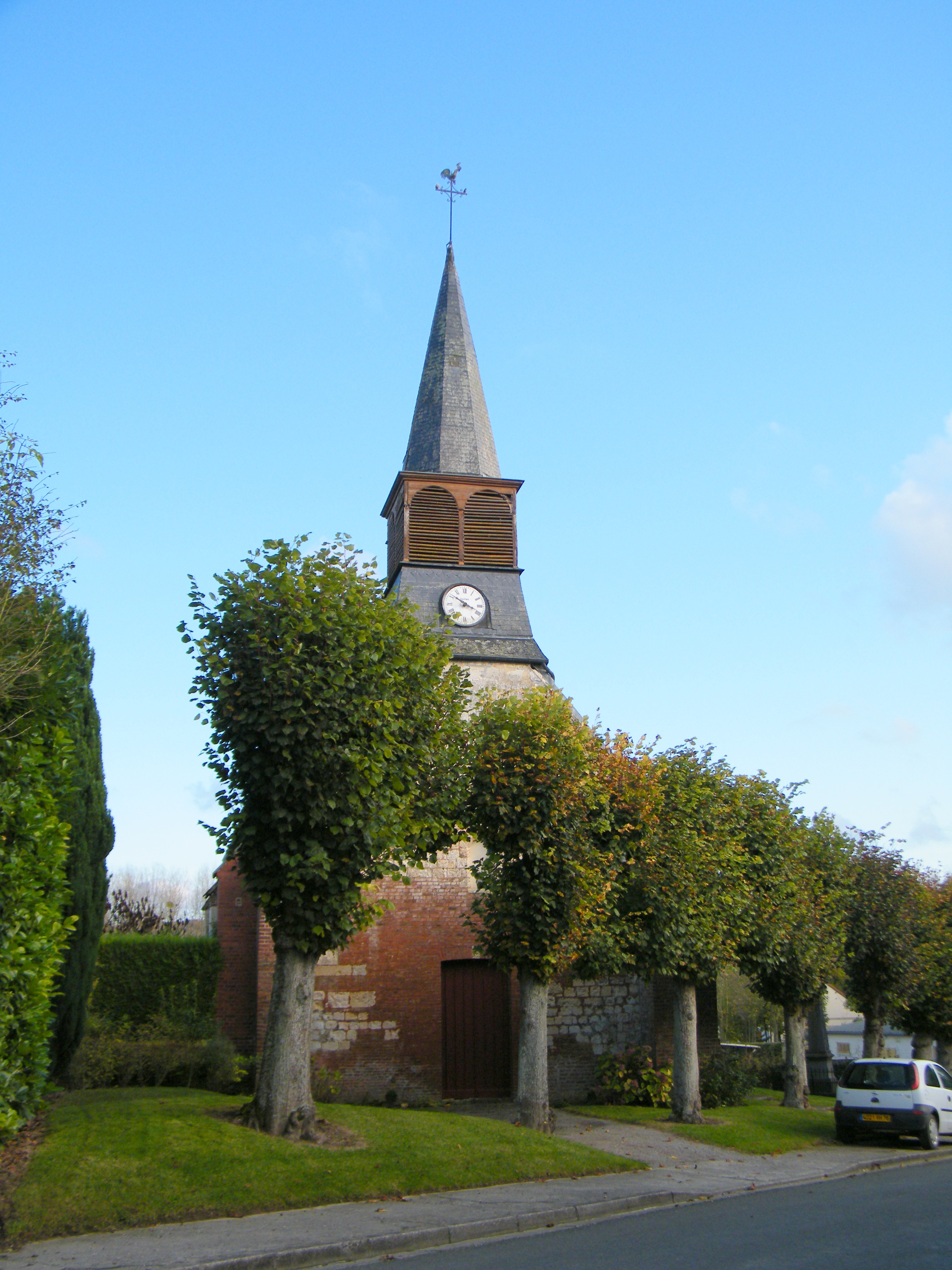 L'église.